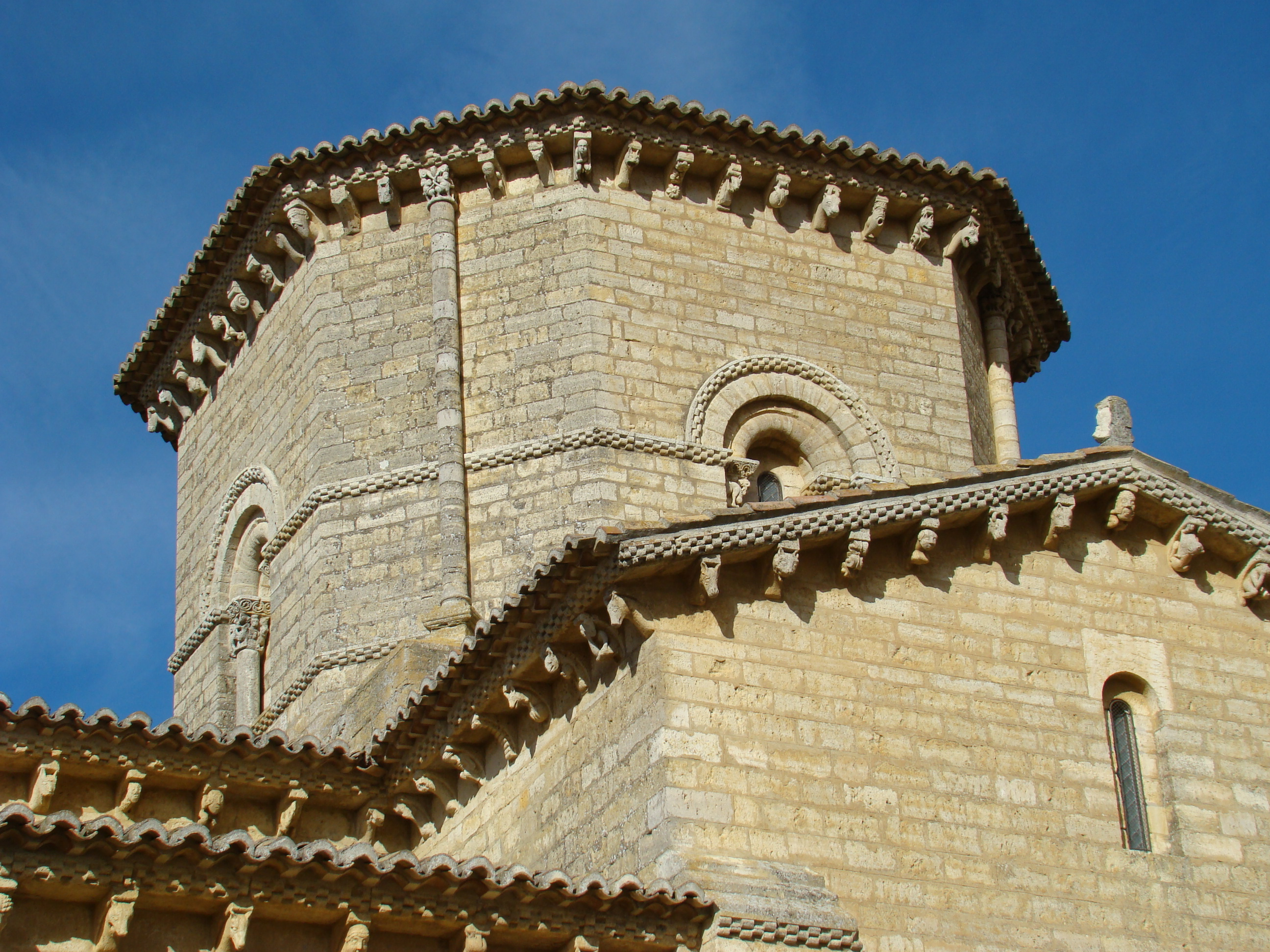 Cimborrio de la iglesia románica de San Martín de Fromista en Palencia (España)